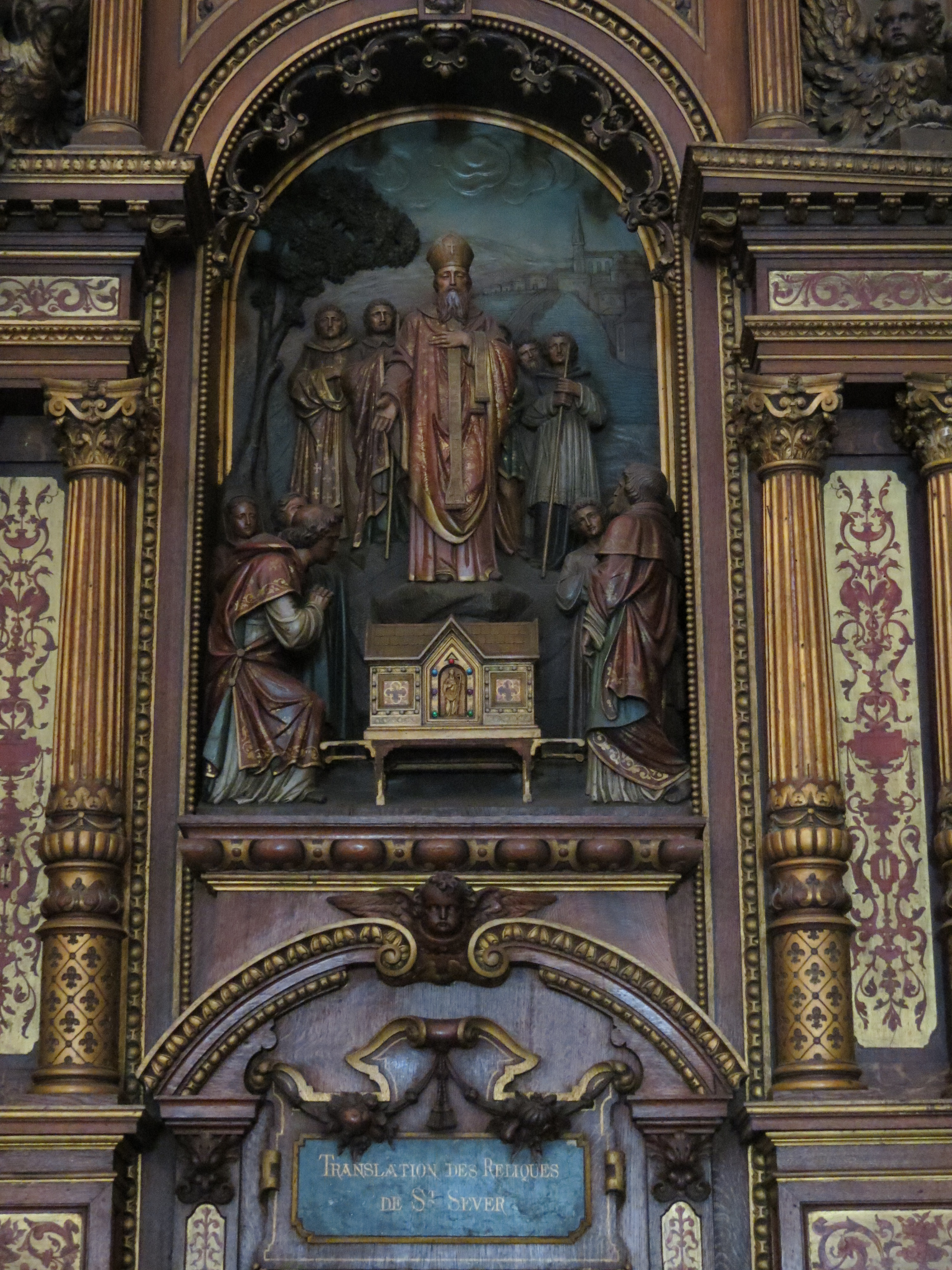 Retable avec la translation des reliques de Saint-Sever.